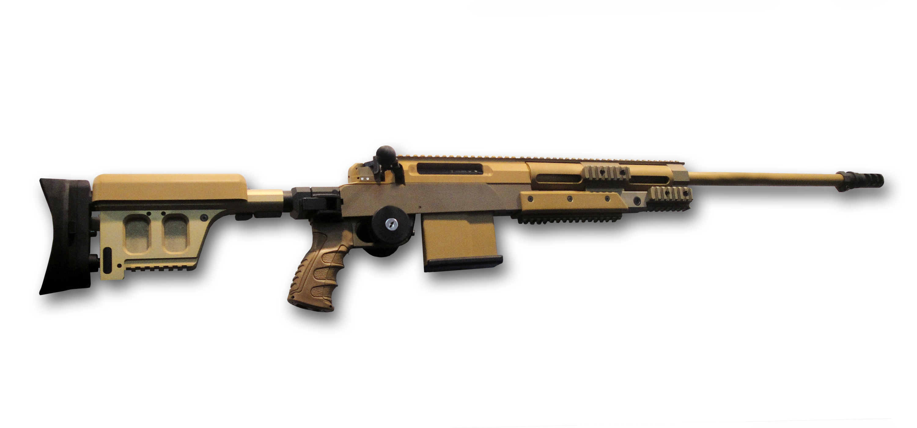 Haenel RS9, IDET/PYROS/ISET 2019, Brünn / Deutsches Scharfschützengewehr G29 mit Abzugssicherung